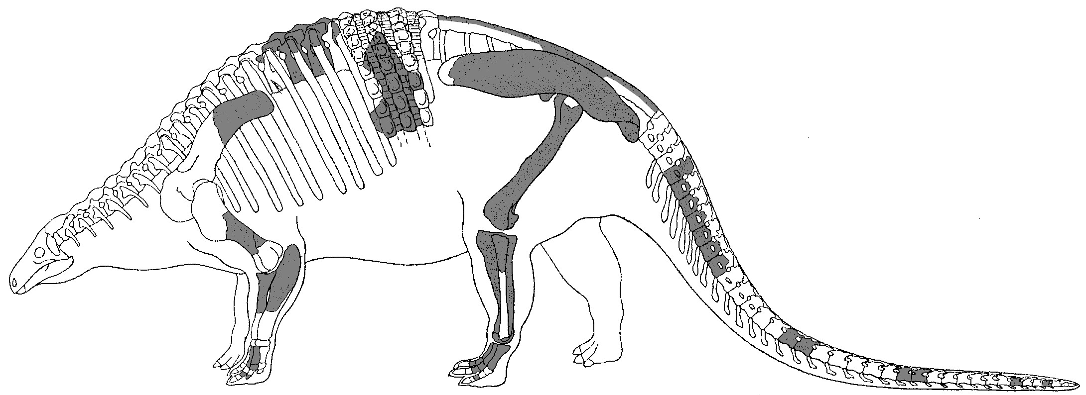 Nodosaurus textilis skeleton restoration